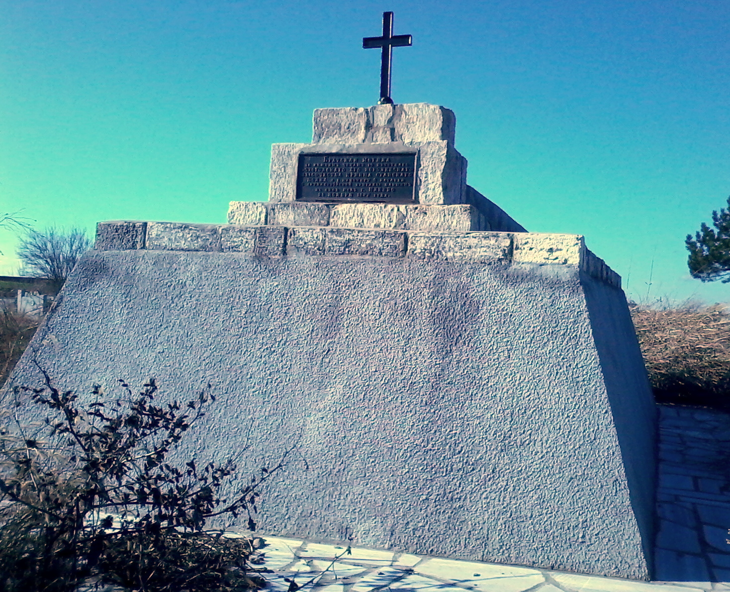 Обновения паметник на 18 Вологодски полк в гробището на Долна Митрополия